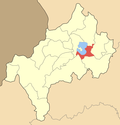 Дем Македнес на картата на Ном Костур, Гърция Locator map of Makednon municipality (Δήμος Μακεδνών) at Kastoria perfecture, Greece).